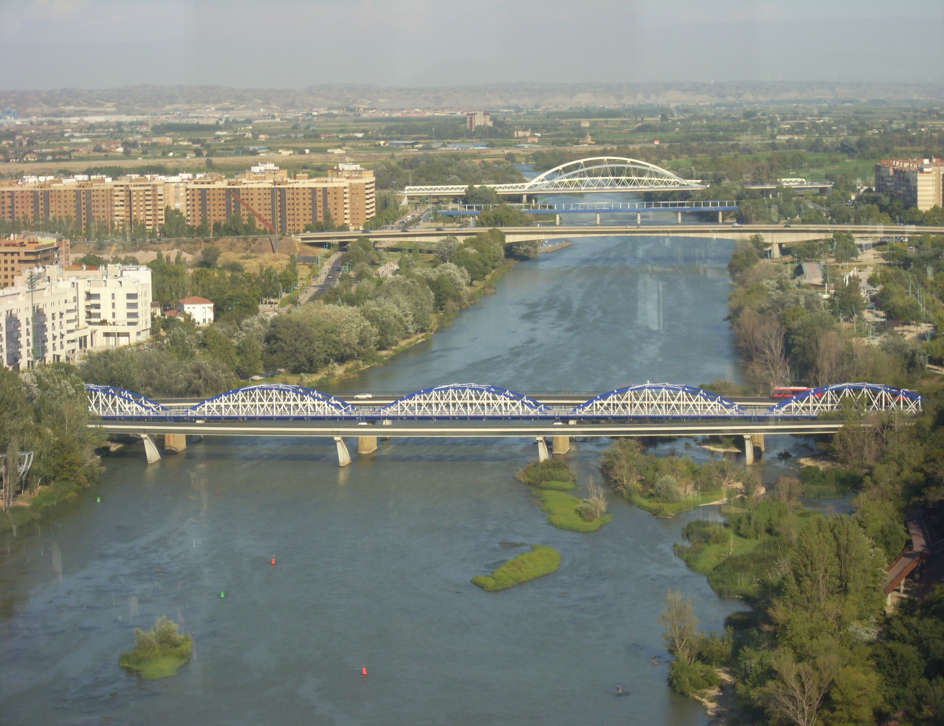 Puente de Hierro, o Puente de Nuestra Señora del Pilar, visto desde la Torre de San Francisco de Borja de la Basílica del Pilar de la ciudad de Zaragoza (España).